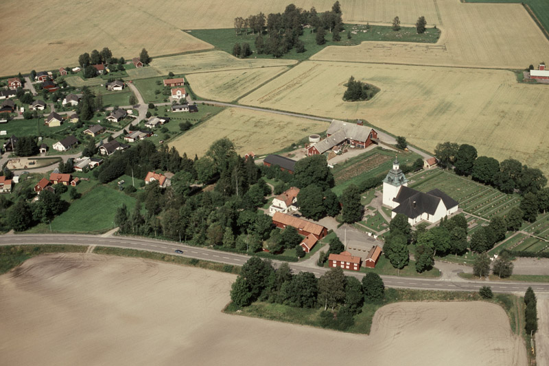 Tjällmo kyrka. Bilden är tagen mot (väderstreck): N Motiv: Tjällmo Nyckelord: Flygbilder, Riksintressen Kategori: Kyrkomiljö Tjällmo kyrka. Bilden är tagen mot (väderstreck): N. Länsväg 211 går söder om kyrkan.